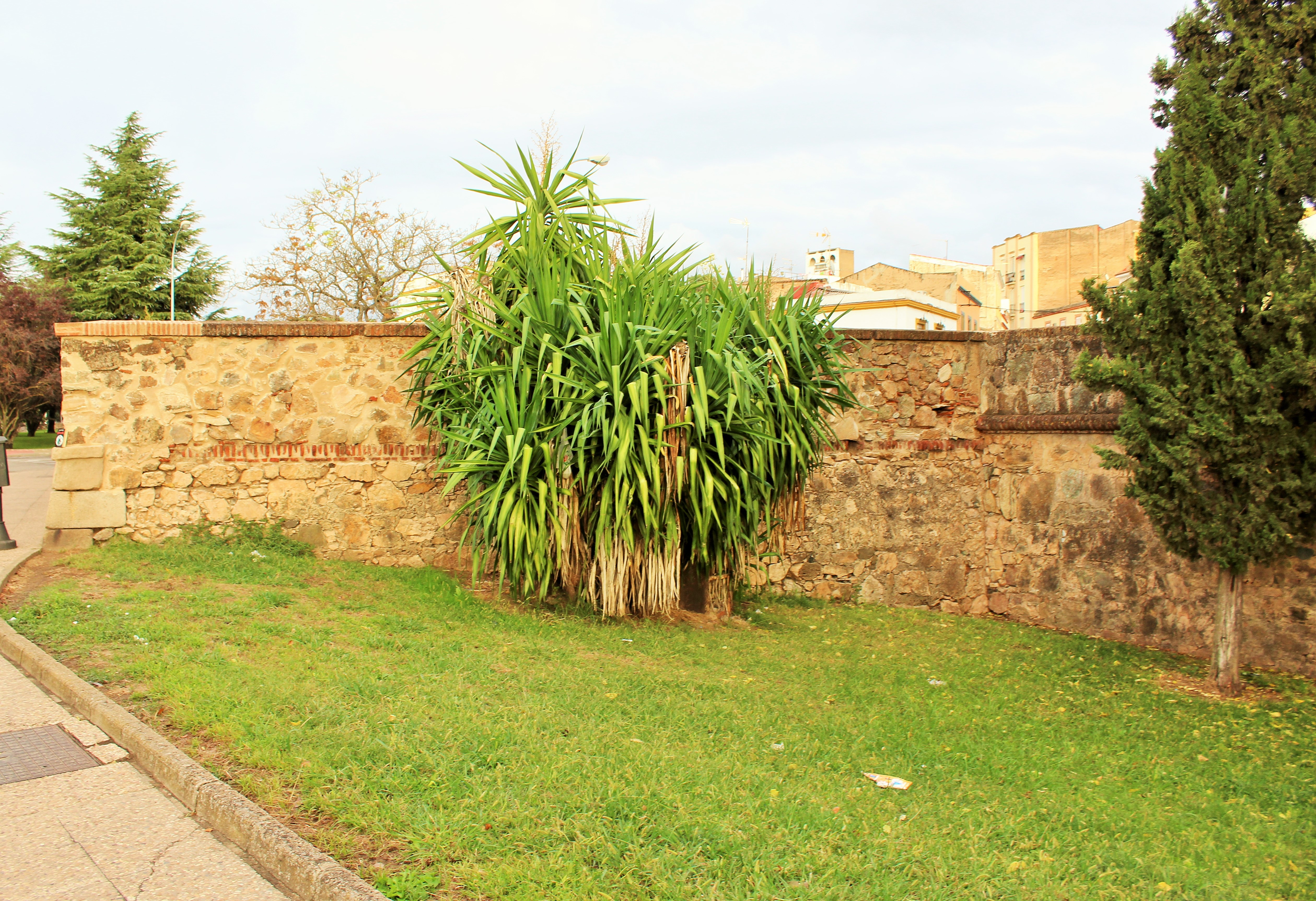 Lugar donde estuvo situada la puerta de Pelambres.